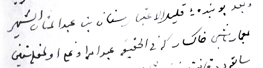 Tuḥfetüʾl-Miʿmārin (تحفةالمعمارین) Zeilen 7 und 8 aus Blatt 4b Transkription: Zeile 7: Ve baʿd bu bende-ʾi qalīlüʾl-iʿtibār Sinān bin ʿAbdüʾl-Mennān eş-şehīr Zeile 8: bi-miʿmārbaşı-yi ḫāksār ki fiʾl-haqīqa ʿAbdullāh oġlı sinīn-i Zeile 7 nennt den Namen Sinān bin ʿAbdüʾl-Mennān, Zeile 8 bezeichnet Sinan als ʿAbdullāh oġlı, d. h. Sohn des Abdullah und ist wie ʿAbdüʾl-Mennān eine Bezeichnung für einen Konvertiten. Handwriting in paper: و بعد بو بنده‌ای قلیل‌الاعتبار سنان بن عبدالمنان الشهیر بمعمارباشی خاکسار كه فی‌الحقیقه عبدالله اوغلی سنینی